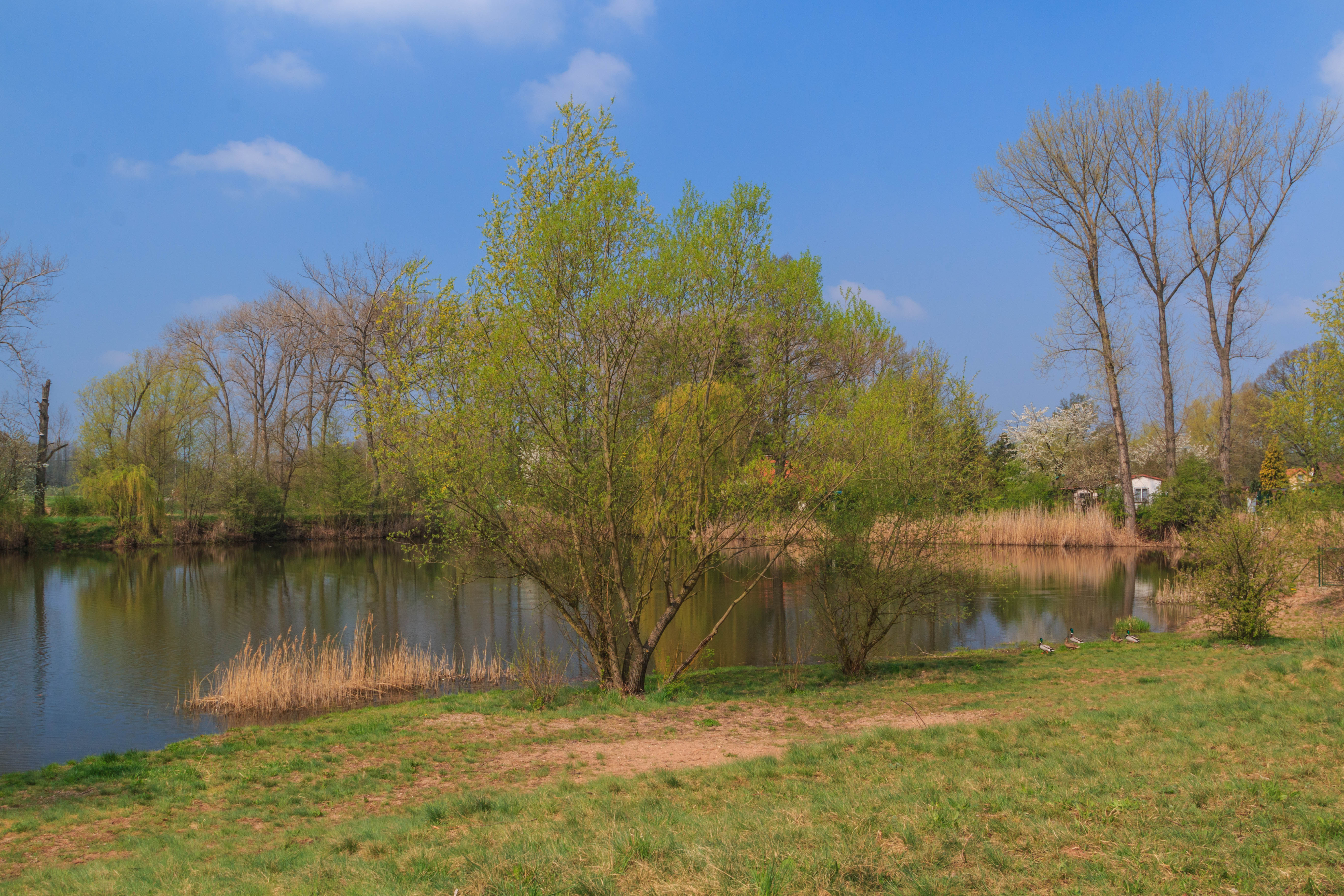 Písník u Červeného Dvora u Hradce Králové Project: Vodstvo.